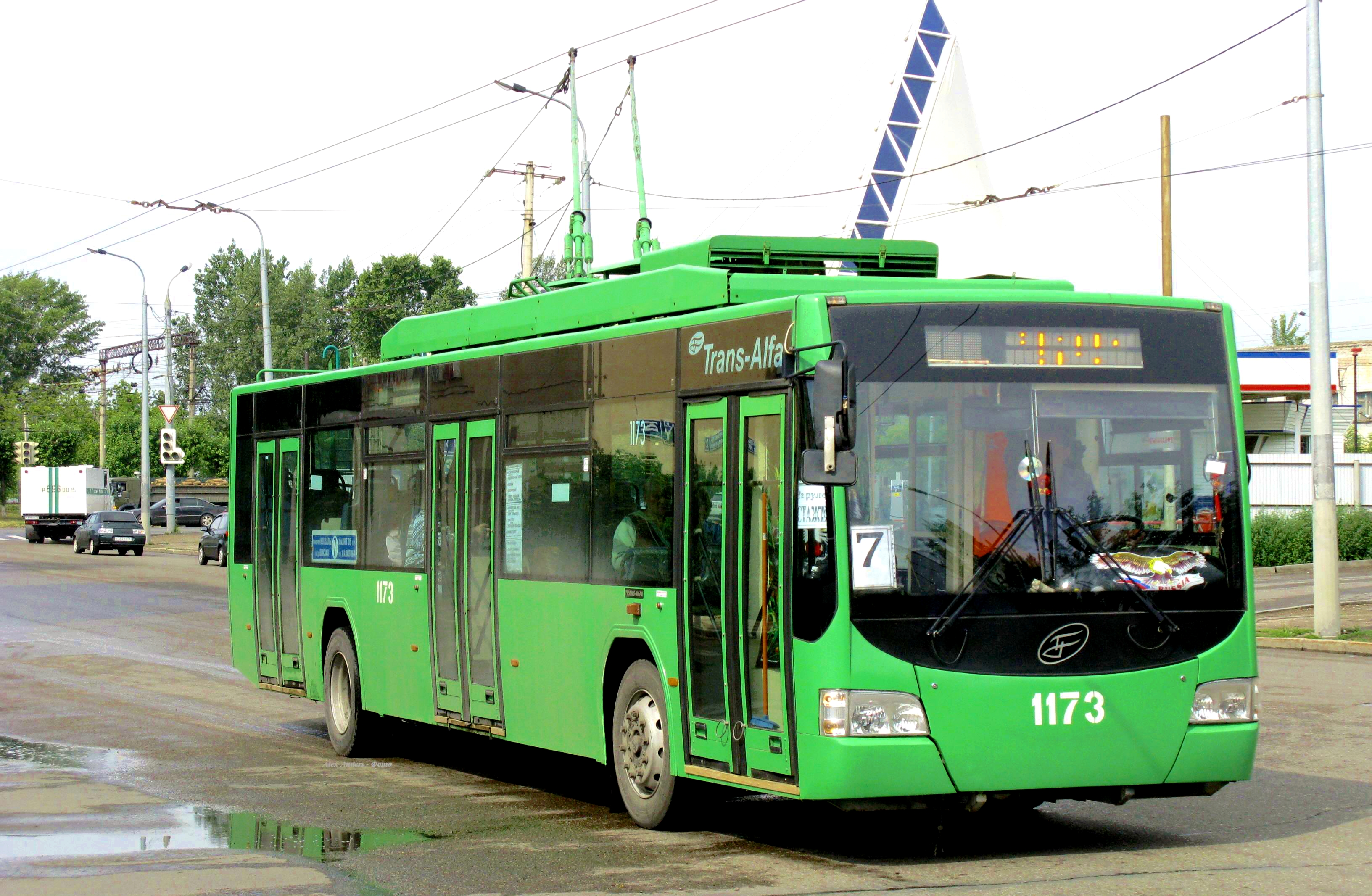 ВМЗ-5298-01 № 1173